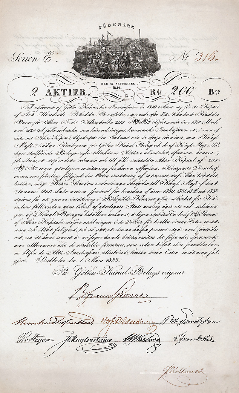 Aktie der Götha-Kanal Bolag vom 1. März 1833